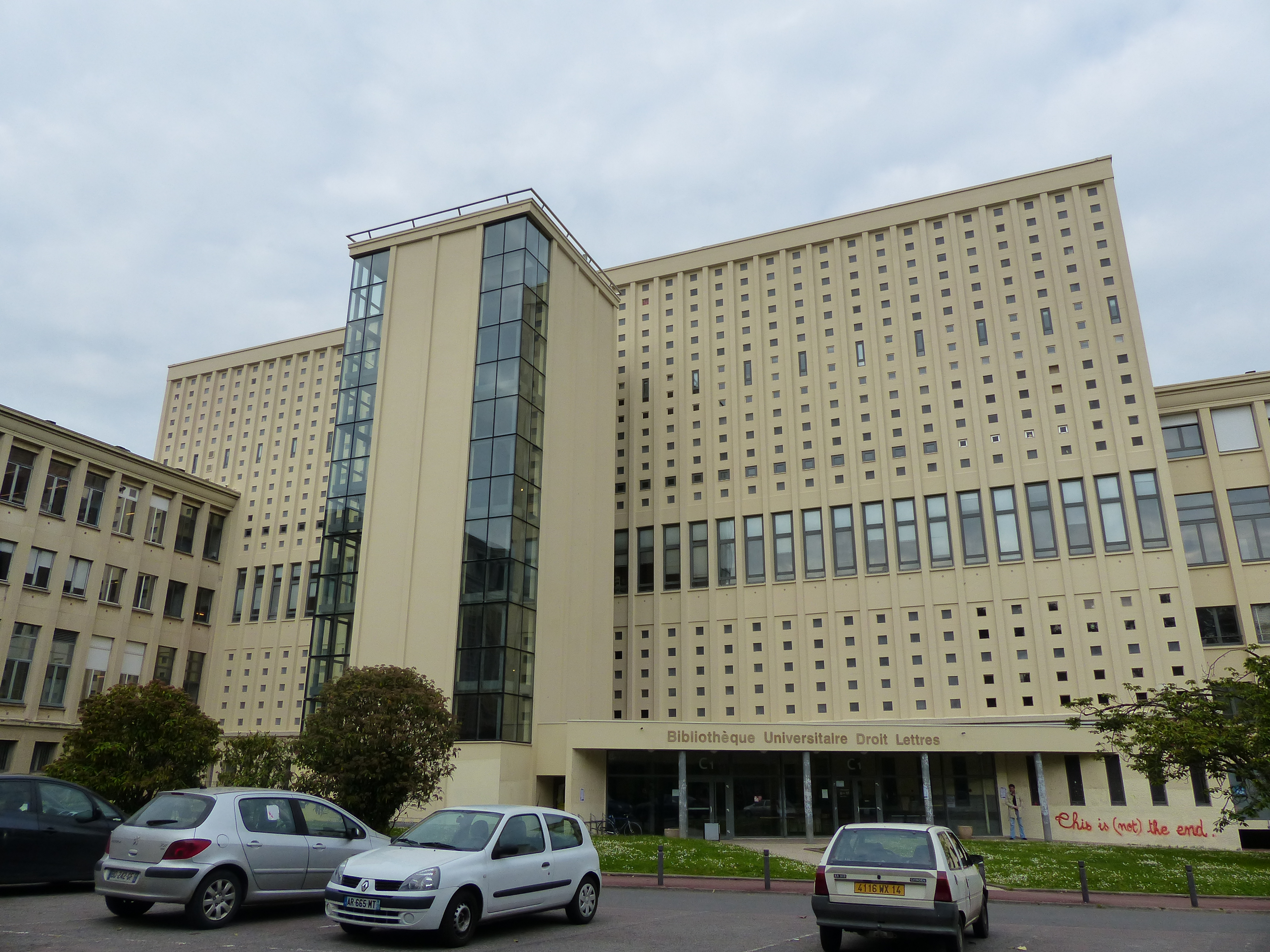 université de Caen, campus 1.